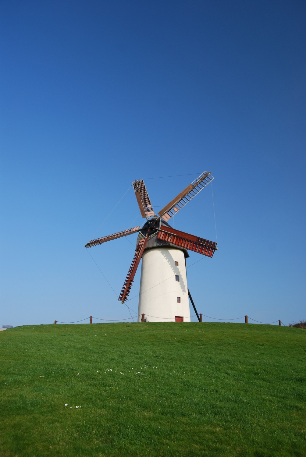 Skerries Windmill